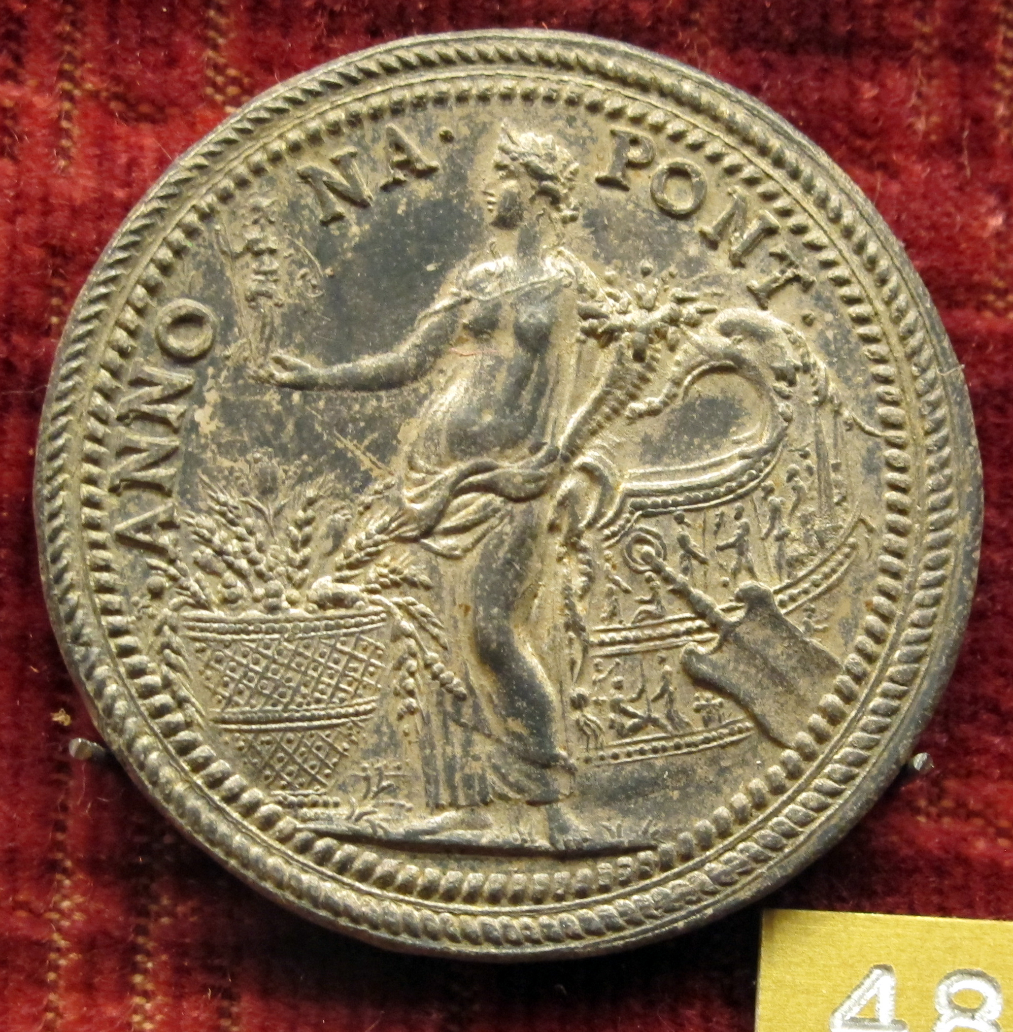 Medaglia papale